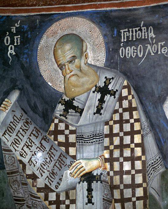 Ikonë e shën Grigor Theologut. Afresk i shek. XVIII, vepër e ikonografit David Selenica, kisha e shën Nikollës, Voskopojë, Korçë